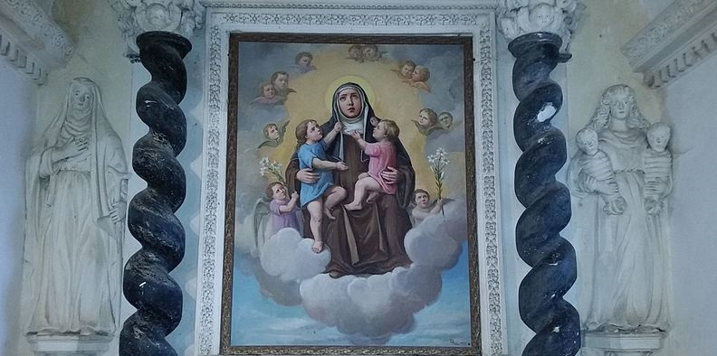 Quadro che rappresenta S. Libera